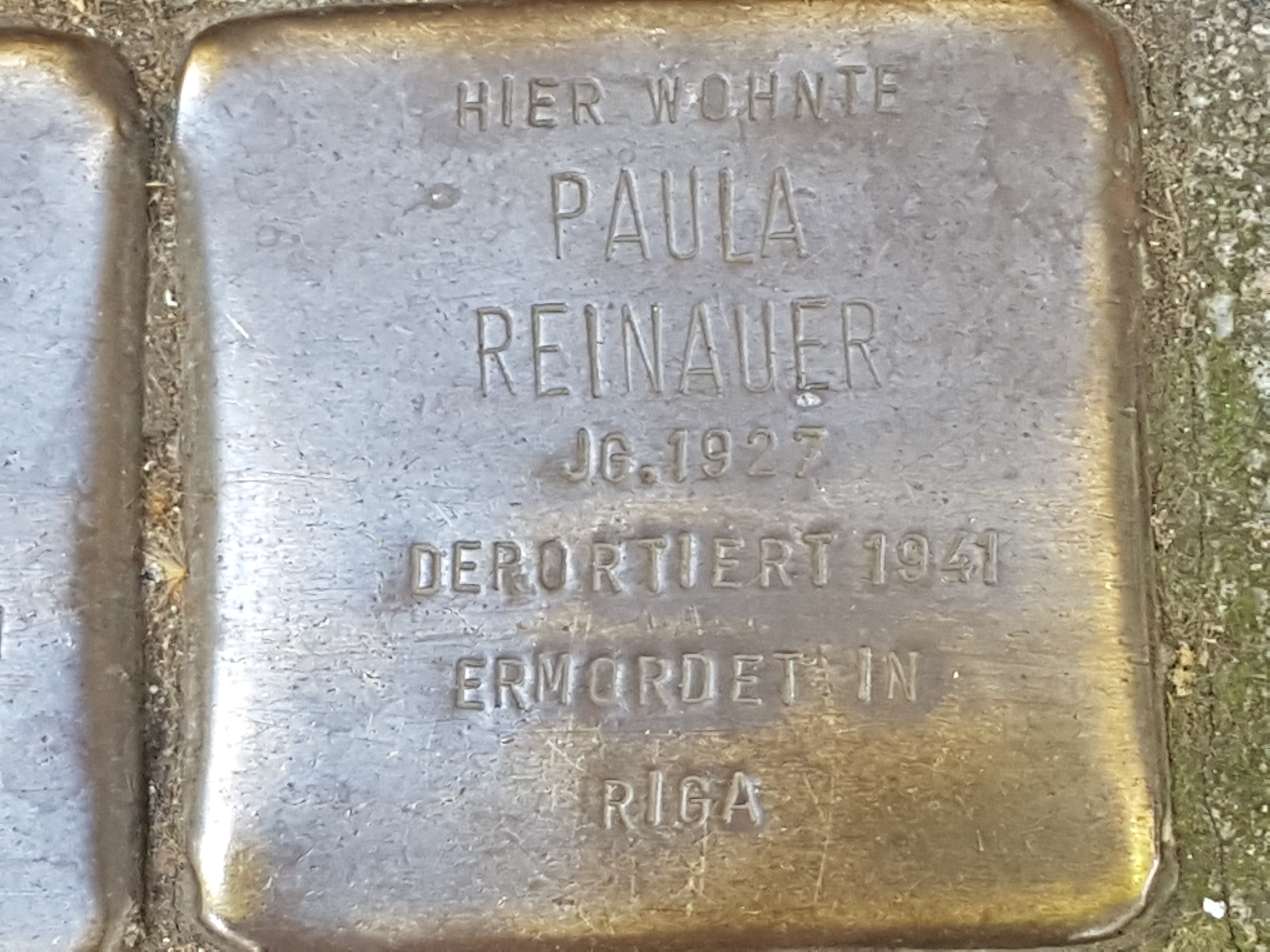 Stolperstein Duisburg